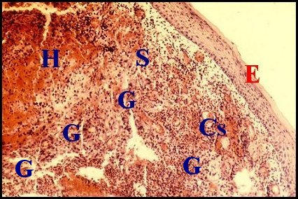 Réaction granulomateuse provoquée par des fils de compresse dans la paroi d'un cholestéatome récidivé.